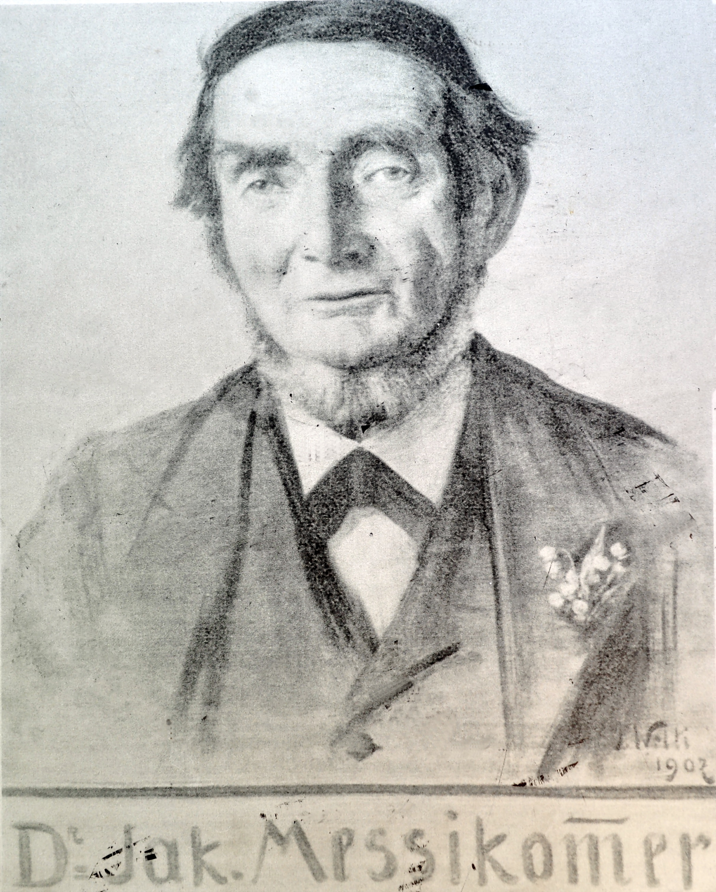 Jakob Messikommer, Robenhausen in Wetzikon (Switzerland) : Dr. Jak. Missikomer, Portrait 1902 von J. Welti.